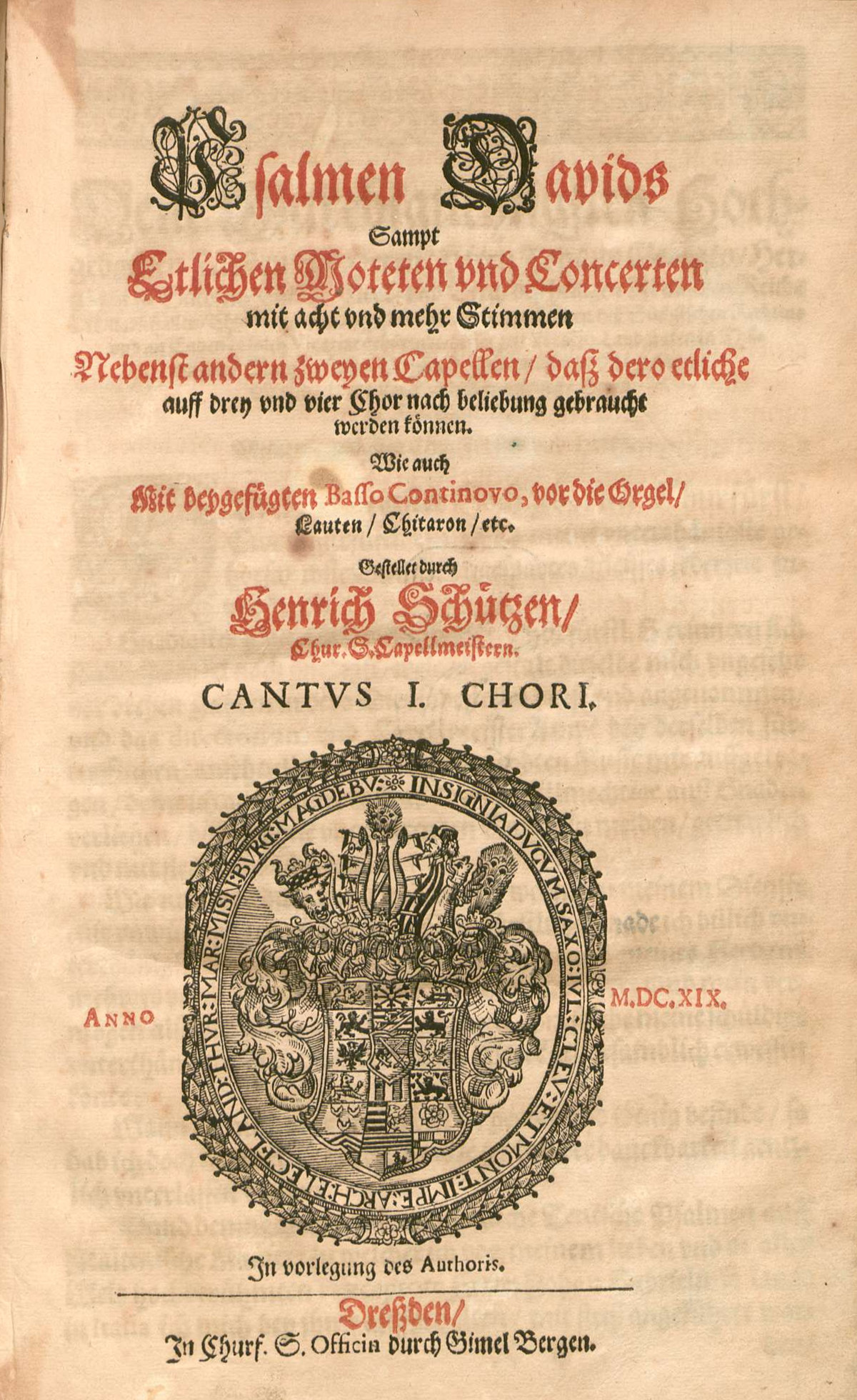 Title page of Schütz' Psalmen Davids